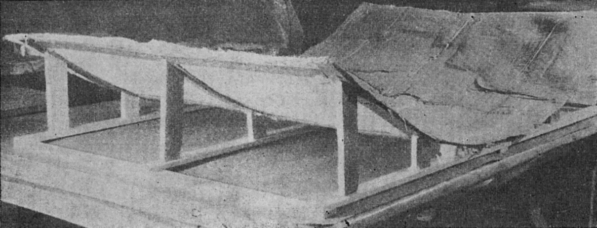 Prace konserwatorskie przy malowidłach z Faras w Muzeum Narodowym w Warszawie. Przygotowania do zdjęcja najwcześniejszego przedstawienie z niszy (łóżeczko gipsowe)